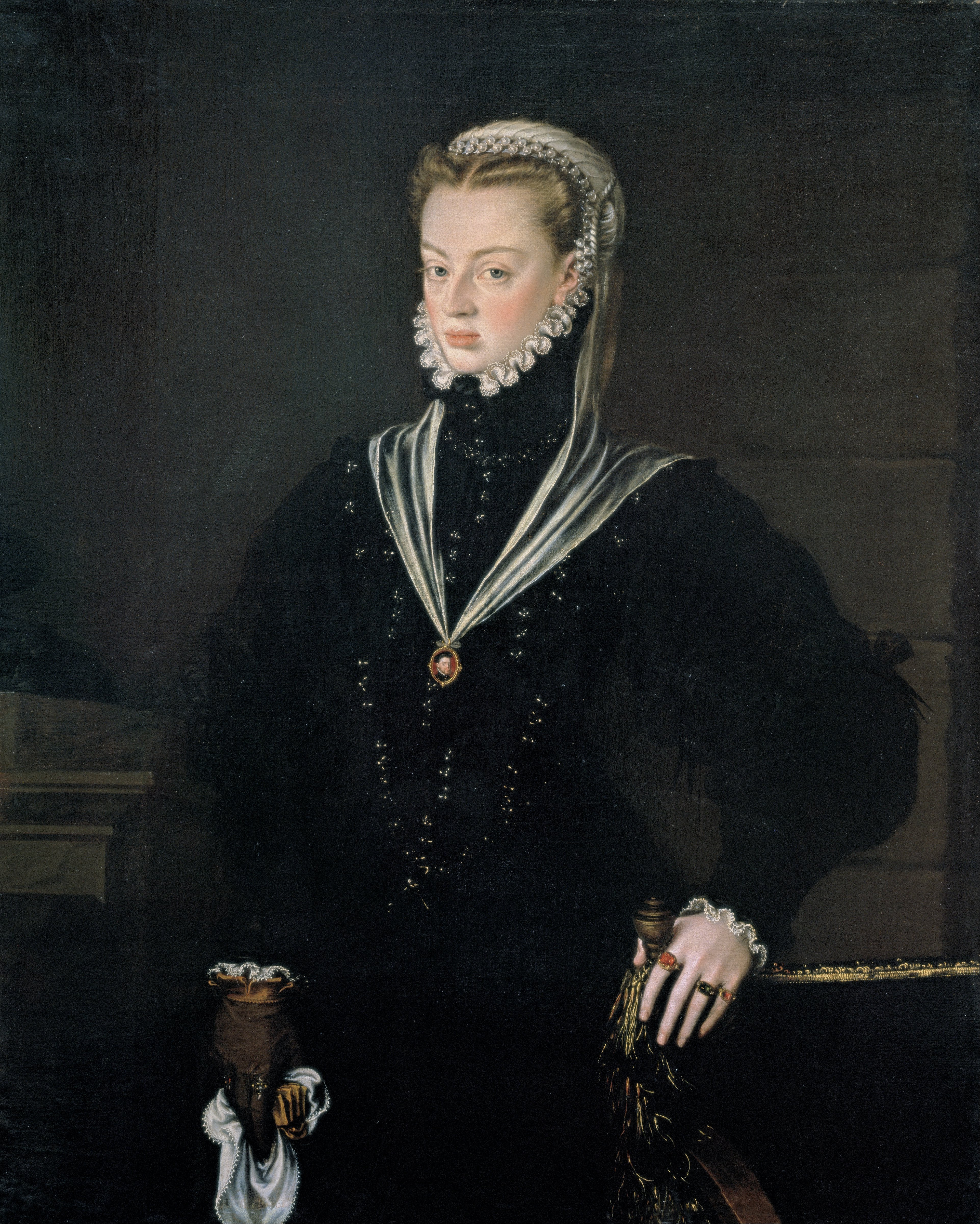 Retrato de Juana de Austria (1535-1573), que fue infanta de España y archiduquesa de Austria y era hija del emperador Carlos I de España y de la reina Isabel de Portugal y también hermana del rey Felipe II de España.